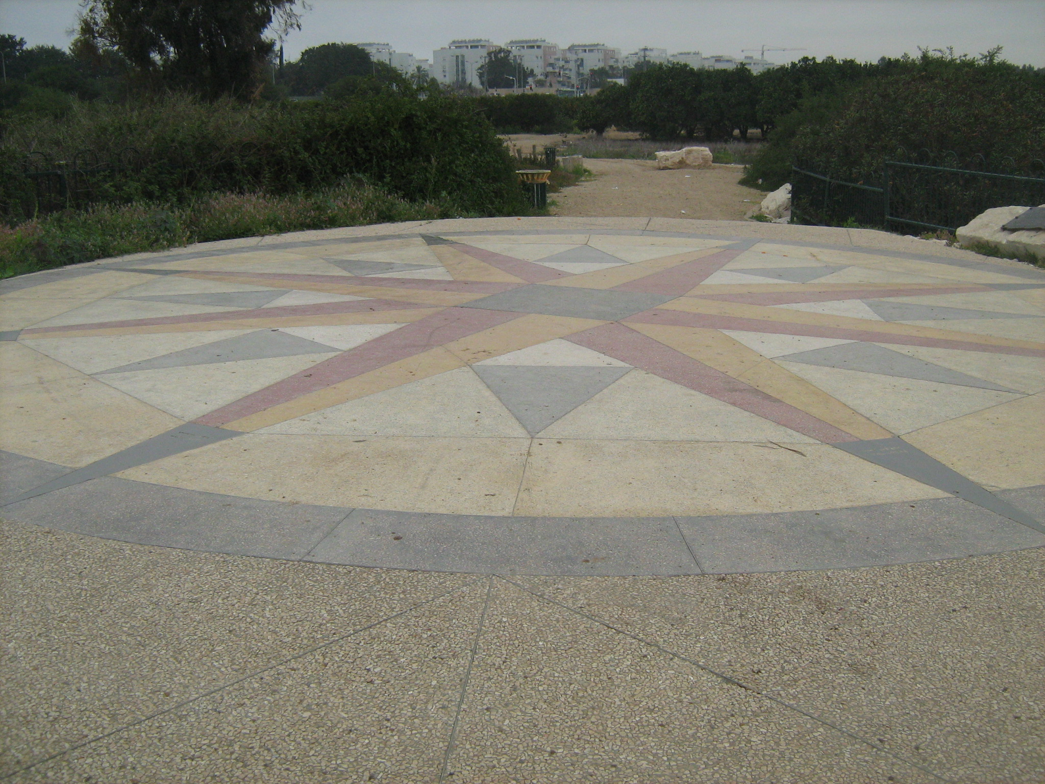 פארק עד הלום